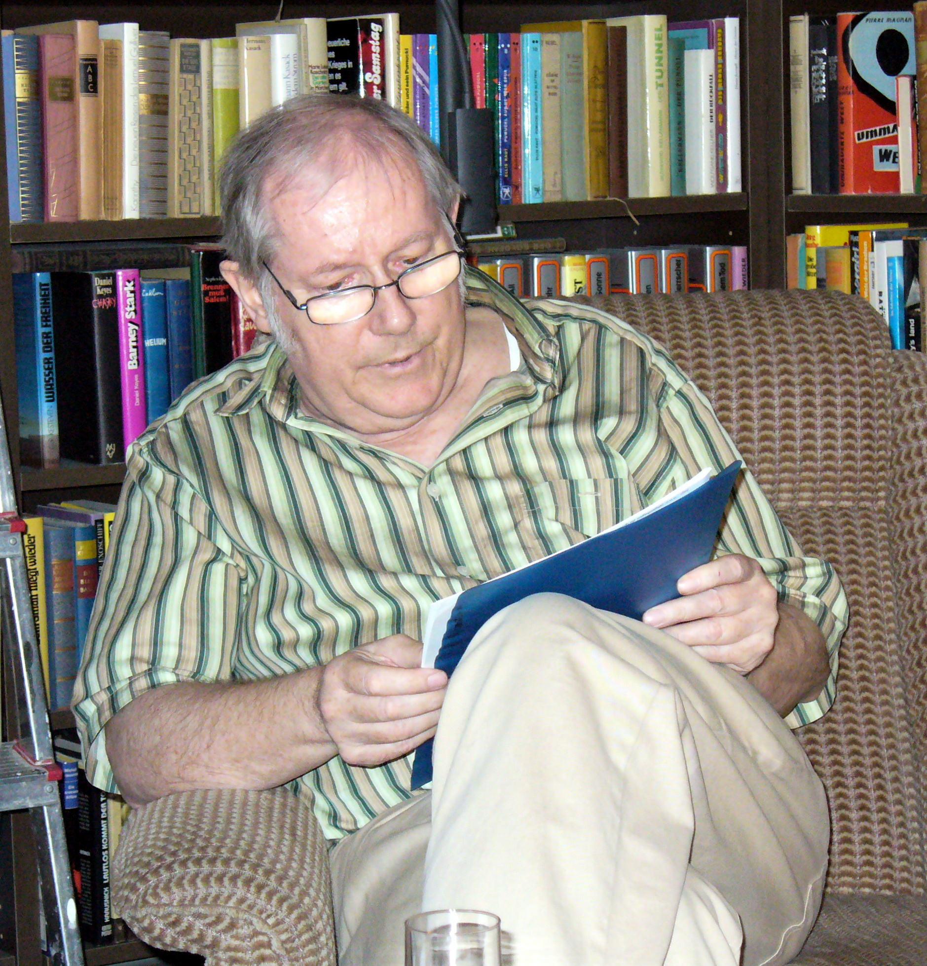 Wolfgang Thadewald (1936–2014): Deutscher Jules Verne-Experte.